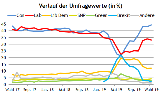 Wahl im UK 2019 Umfragen für Großbritannien